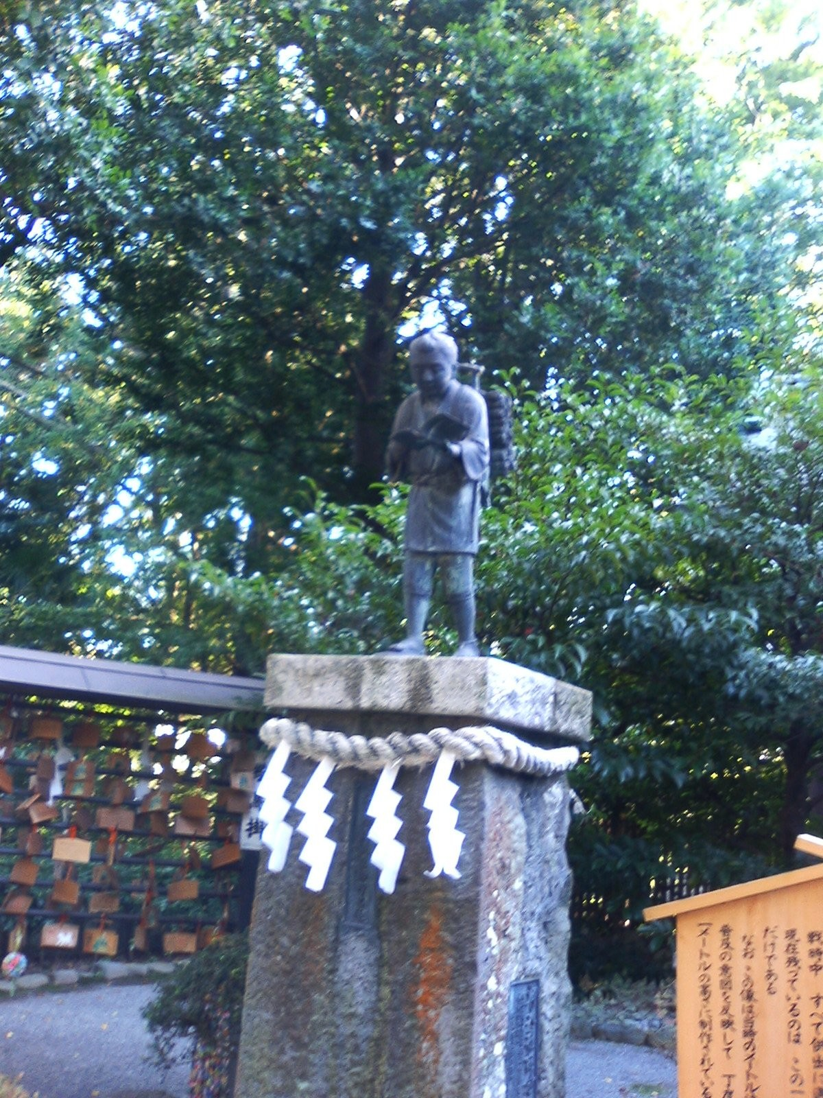 Statue of Ninomiya Sontoku at Hotokuninomiya-jinjya(shrine) in Odawara, Kanagawa near Odawara Castle